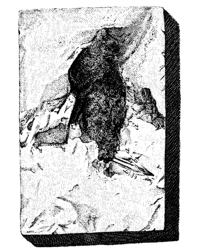 « Ornitholithe de Montmartre » chez Alberto Fortis, qui le considère comme le fossile d'une quelconque grenouille ou crapaud. Ce fossile sera décrit scientifiquement par Paul Gervais en 1852 sous le nom de Sitta? Cuvieri.